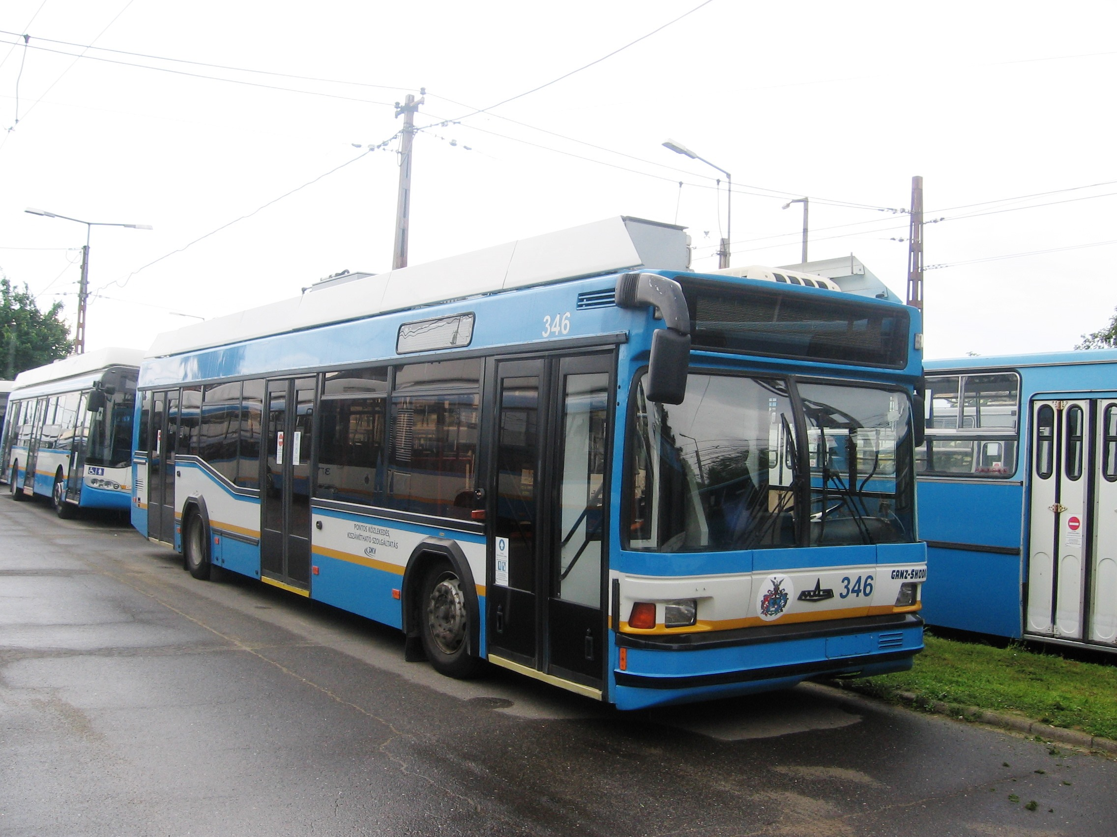 MAZ 103T